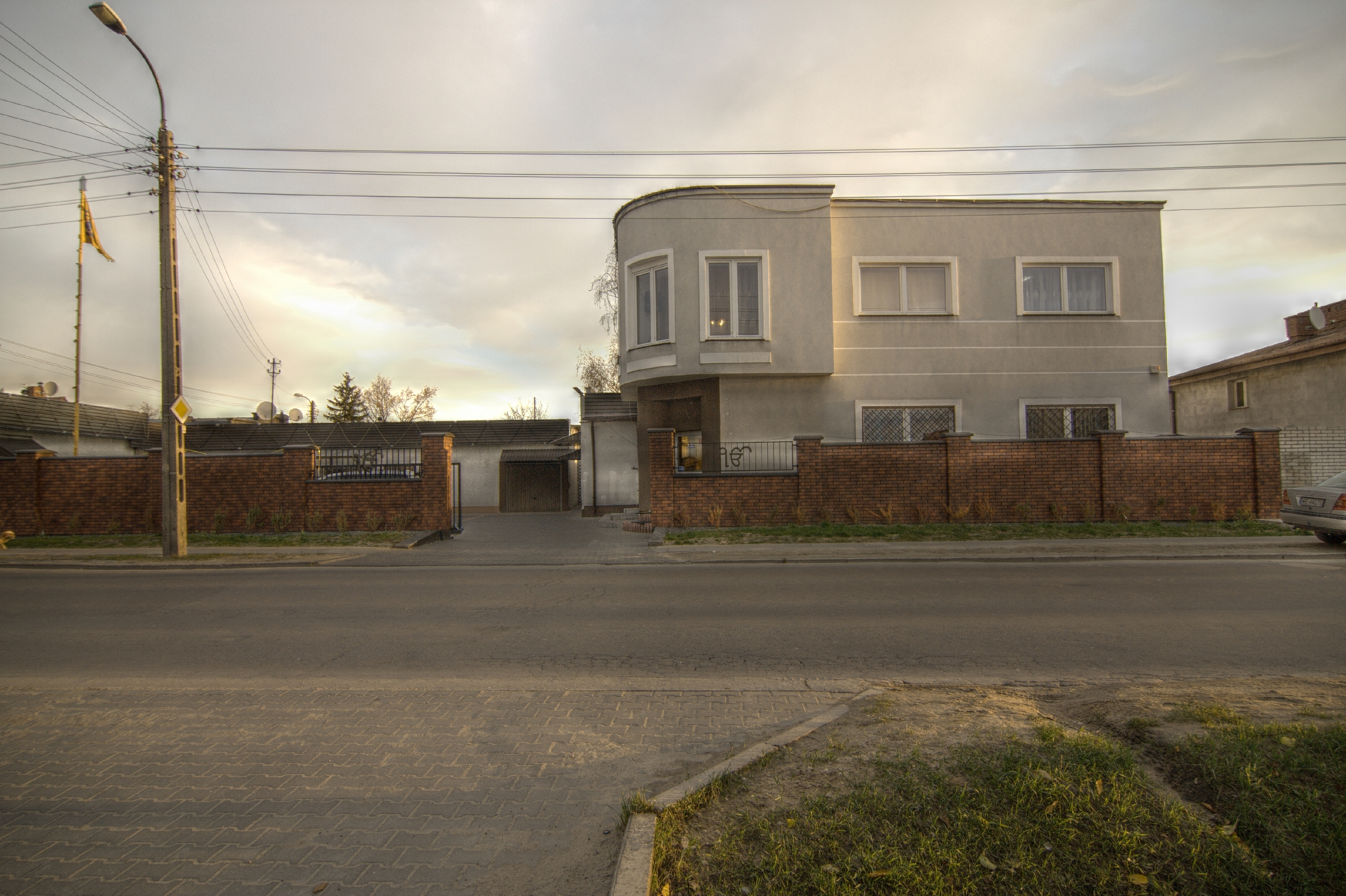 Singh Saba Gurudwara in Poland